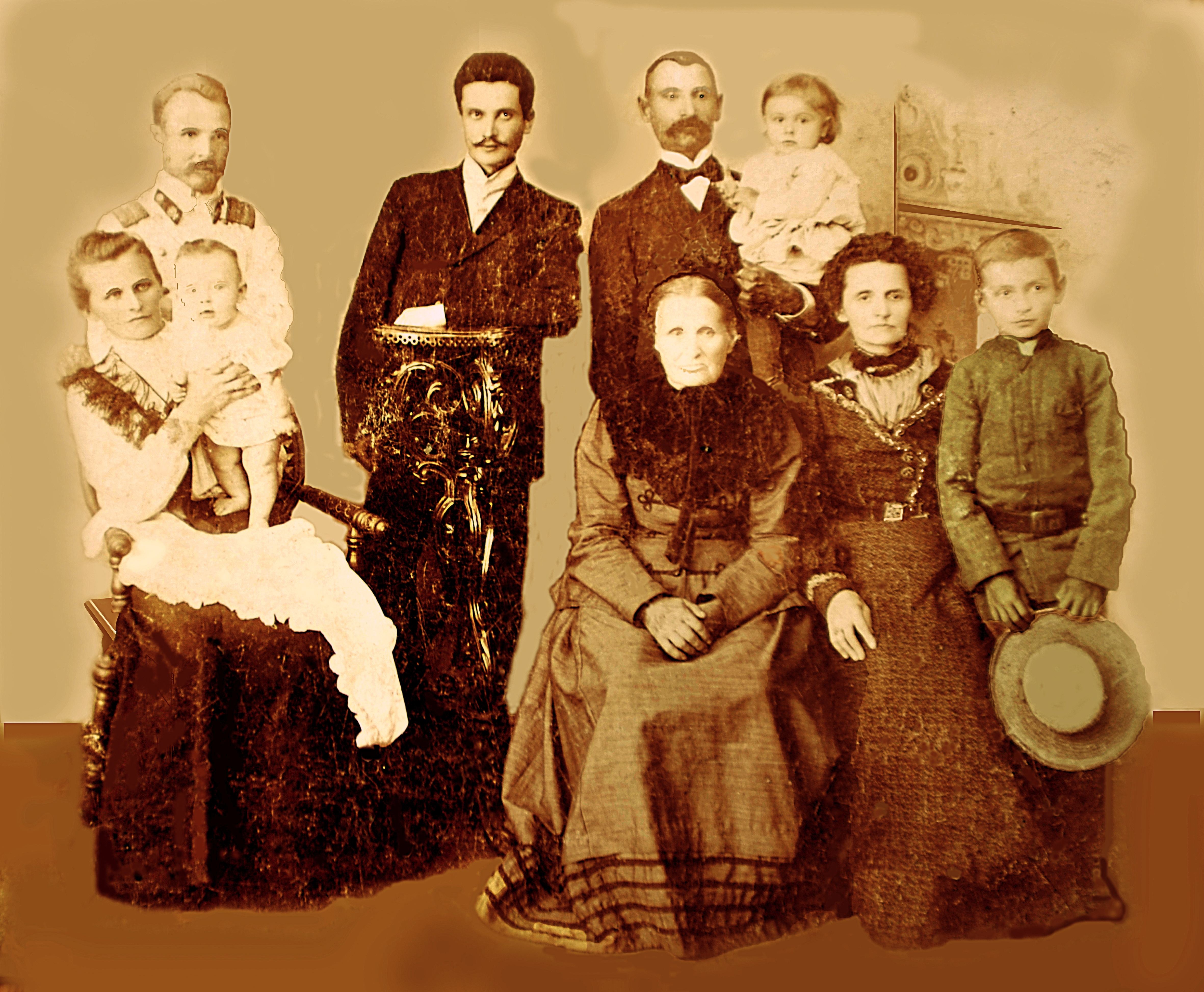 Семейная фотография 1903 года. Справа налево сидят: Эдуард Антононович Гущо, Ядвига Валериановна Гущо, Елизавета Стефановна Гинтовт-Дзевялтовская, Эмилия Казимировна Гинтовт-Дзевялтовская с дочерью Еленой; стоят: Антон Матвеевич Гущо с сыном Петром, Бронислав Матвеевич Гущо, Станислав Валерианович Гинтовт-Дзевялтовский). Фотография из личного архива Ю.П.Гущо